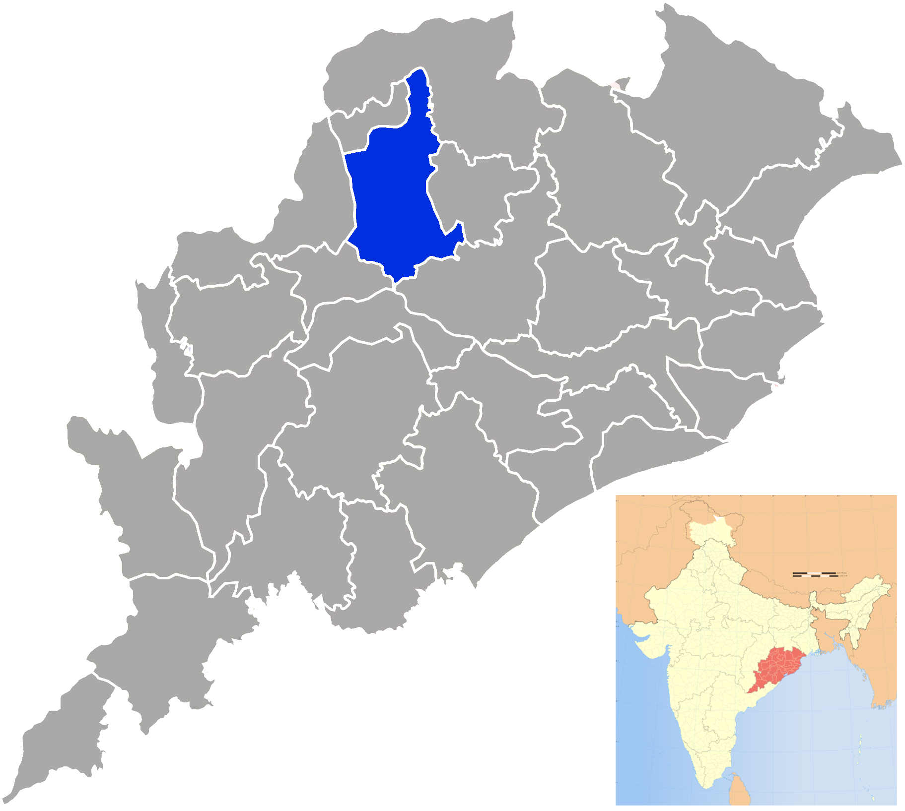 Distrito de Sambalpur en Orissa